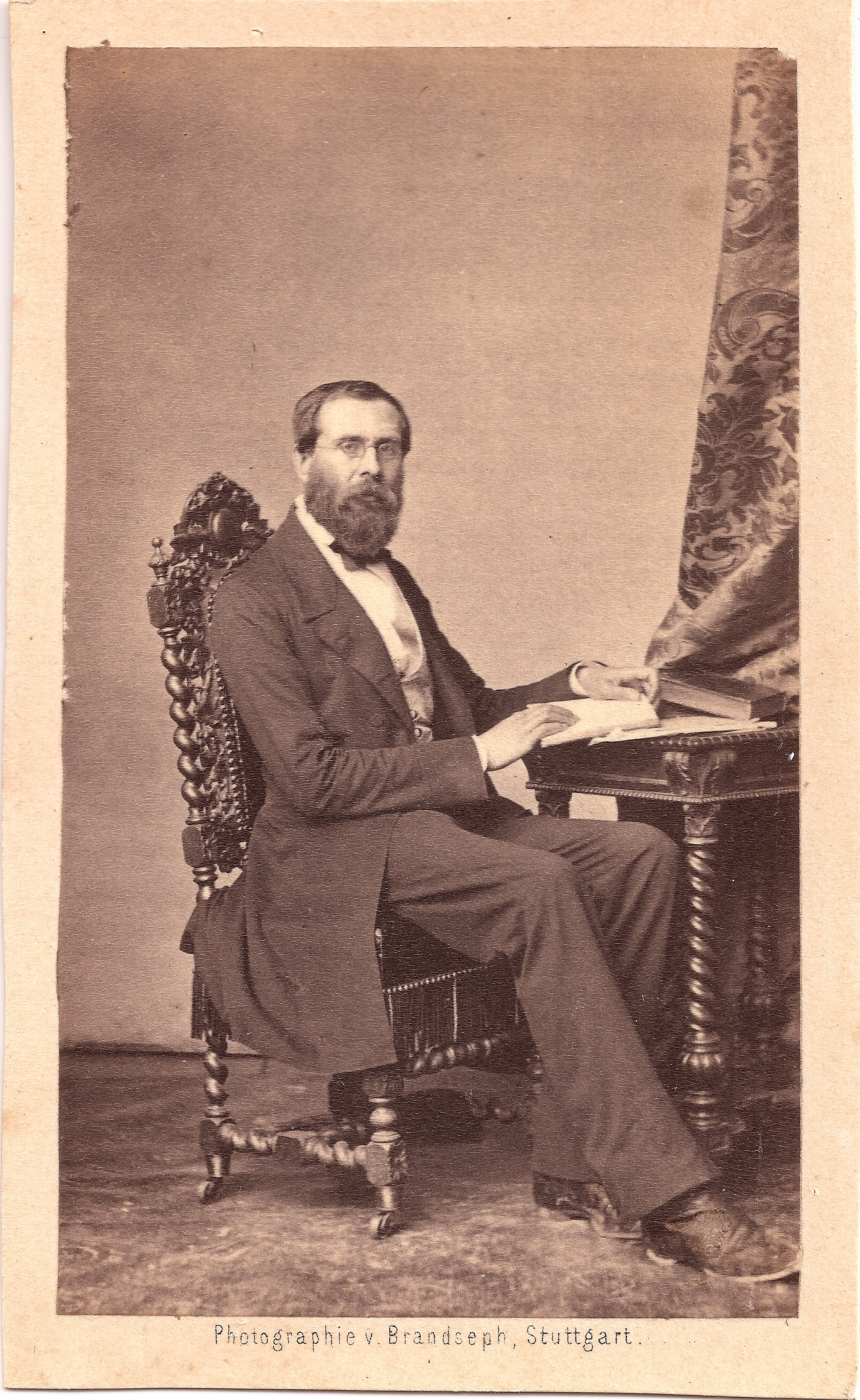 Wilhelm Roser, I. Ehe mit Fanny Weber, II. Ehe mit Charlotte Haug und III. Ehe mit Amalie Malwine Haug, Töchter von Karl Friedrich Haug, Albuminpapier